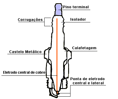 Vela de ignição (diagrama) / Spark plug (diagram)